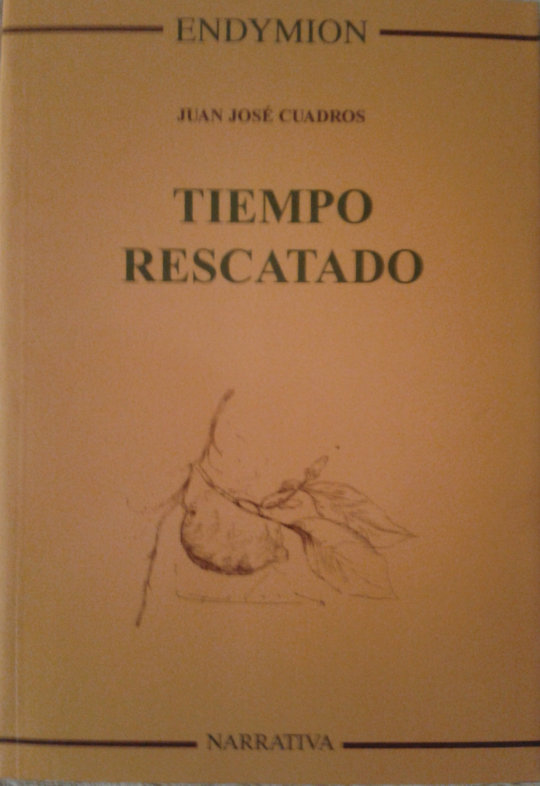 Portada del libro Tiempo rescatado de Juan José Cuadros